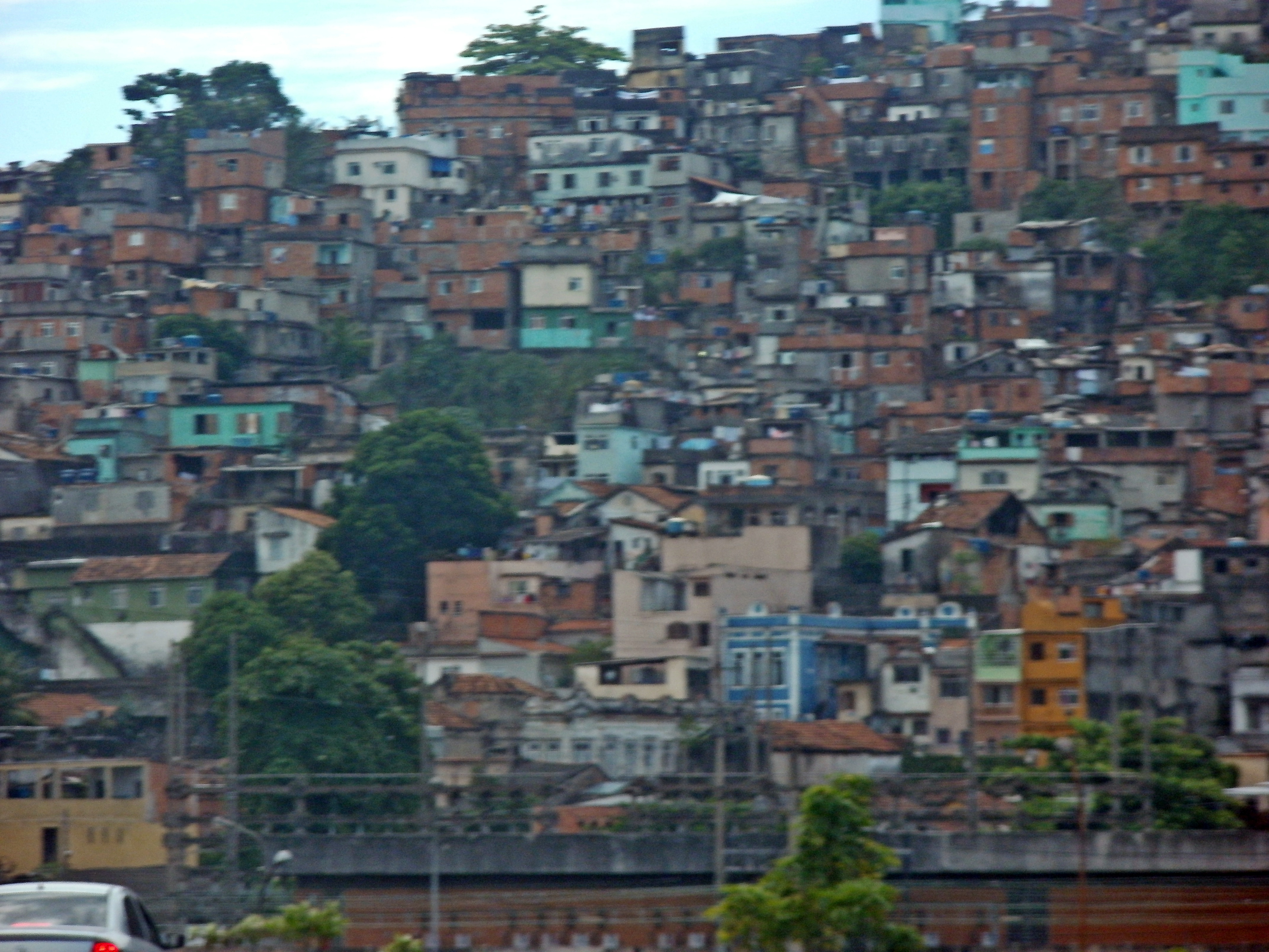 Morro da Providência, favela situado entre os bairros Santo Cristo e Gamboa, cidade do Rio de Janeiro, Brasil.